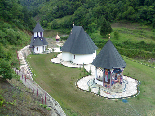 Манастир Сасе, саграђен 1242. године, задужбина Уроша Немањића.